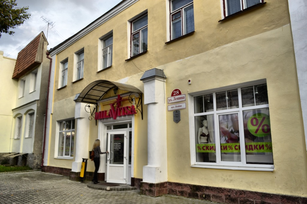 Беларуская (тарашкевіца): Гістарычны цэнтр г. Пінска: будынкі, збудаваньні, планіровачная структура, ландшафт і культурны пласт на тэрыторыі, абмежаванай з захадувул. Чарняхоўскага,з поўначы – вул. Завальнай, па мяжы дваровых тэрыторый дамоў № 1, 7,9, 11, 13, 19, 25, 27 па гэтай вуліцы, вул. Кірава, уключаючы дваровыя тэрыторыі дамоў № 1, 13 па вуліцы Кірава, з усходу – вул. Савецкай, у тым ліку дома № 5 па вул. Іркуцка-Пінскай Дывізіі, дома № 2 па вул. Кулікова, дома № 3 на пл. Кастрычніка, памяжы дваровых тэрыторый забудовы няцотнага боку дамоў № 1, 3па вул. Кіеўскай, да перакрыжаваньняз вул. Альхоўскіх, ад перакрыжаваньня з вул. Дняпроўскай Флятыліі,па вул. Дняпроўскай Флятыліі, уключаючы дваровыя тэрыторыі дамоў№ 39, 41 гэтай вуліцы, з поўдня —левым берагам р. Піна да перасячэньня з вул. Чарняхоўскага. г. Пінск This is a photo of Belarusian heritage monument. Reference number: 112Е000529 ( WLM)